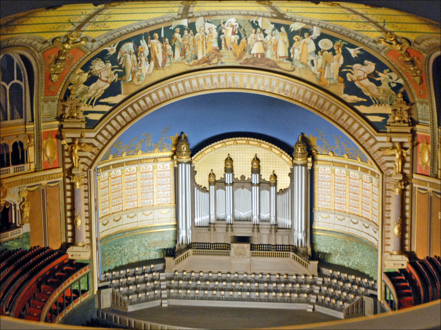 Maquette de la salle de spectacle du Palais du Trocadéro Cité de l'architecture et du patrimoine Musée des monuments français / dépôt du musée de la musique, cité de la musique Exposition "Esprit(s) des lieux. Du Trocadéro au Palais de Challiot" La salle de spectacle de Palais du Trocadéro ouverte en 1878 (architectes : Gabriel Davioud (1824-1881) et Jules Bourdais (1835-1915)) comprenait 4600 places, c'était la plus grande du Paris de l'époque. Son acoustique était très mauvaise comme on peut le lire dans les journaux rendant compte des manifestations qui s'y passaient. Mais les principales critiques portaient sur l'aspect hétéroclite de l'architecture du Palais. Sur la scène, avait été installé un orgue réalisé par Cavaillé-Coll (1811-1899) avec 4 claviers, 66 jeux et 4070 tuyaux La décoration peinte était de Charles Lameire (1832-1910) Les sculptures d'ornement étaient de Louis Villeminot (1826-1914) et Albert-Ernest Carrier-Belleuse (1824-1887) Le bâtiment a été en partie détruit en 1935 pour construire le Palais de Chaillot centre de l'exposition internationale de 1937. Le centre du palais a été transformé en esplanade et les deux ailes ont été agrandies dans le style art déco que l'on connait (architectes : Jacques Carlu, LH Boileau et L. Azéma) Cette petite exposition présentée à la Cité de l'architecture et du patrimoine est à visiter sans faute car elle présente avec de nombreux documents, objets et maquettes peu connus l'histoire d'un site parisien familier à tous et qui, face à la Tour Eiffel, a été au coeur des expositions universelles, internationales et nationales qui se sont déroulées en France. site de l'exposition Esprit(s) des Lieux Article de Wikipedia sur le palais du Trocadéro